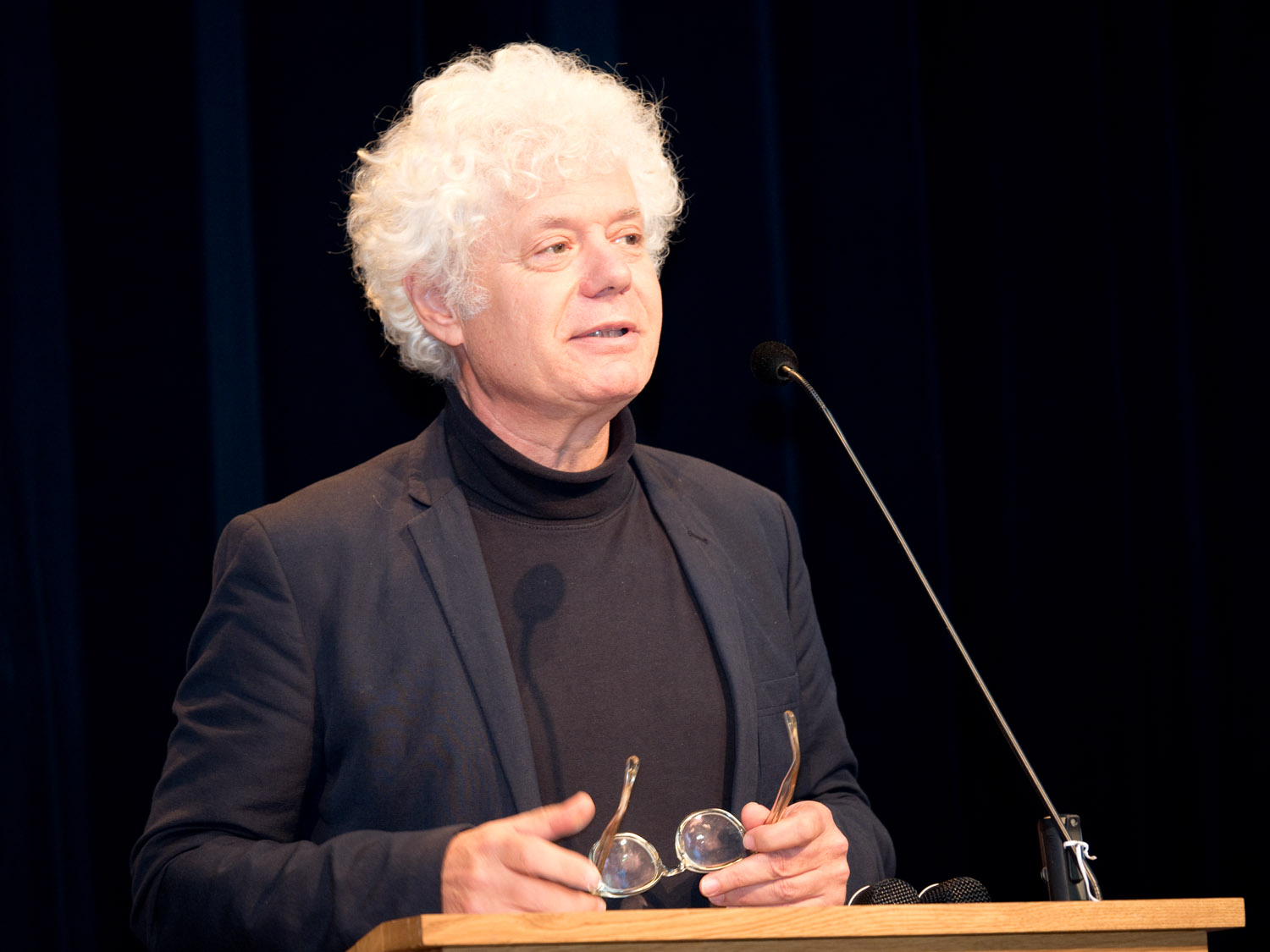 Paul Scheffer, De Balie, Amsterdam, 10 oktober 2015. Scheffer geeft de Anton Constandse lezing met als titel 'De exodus en wij'.